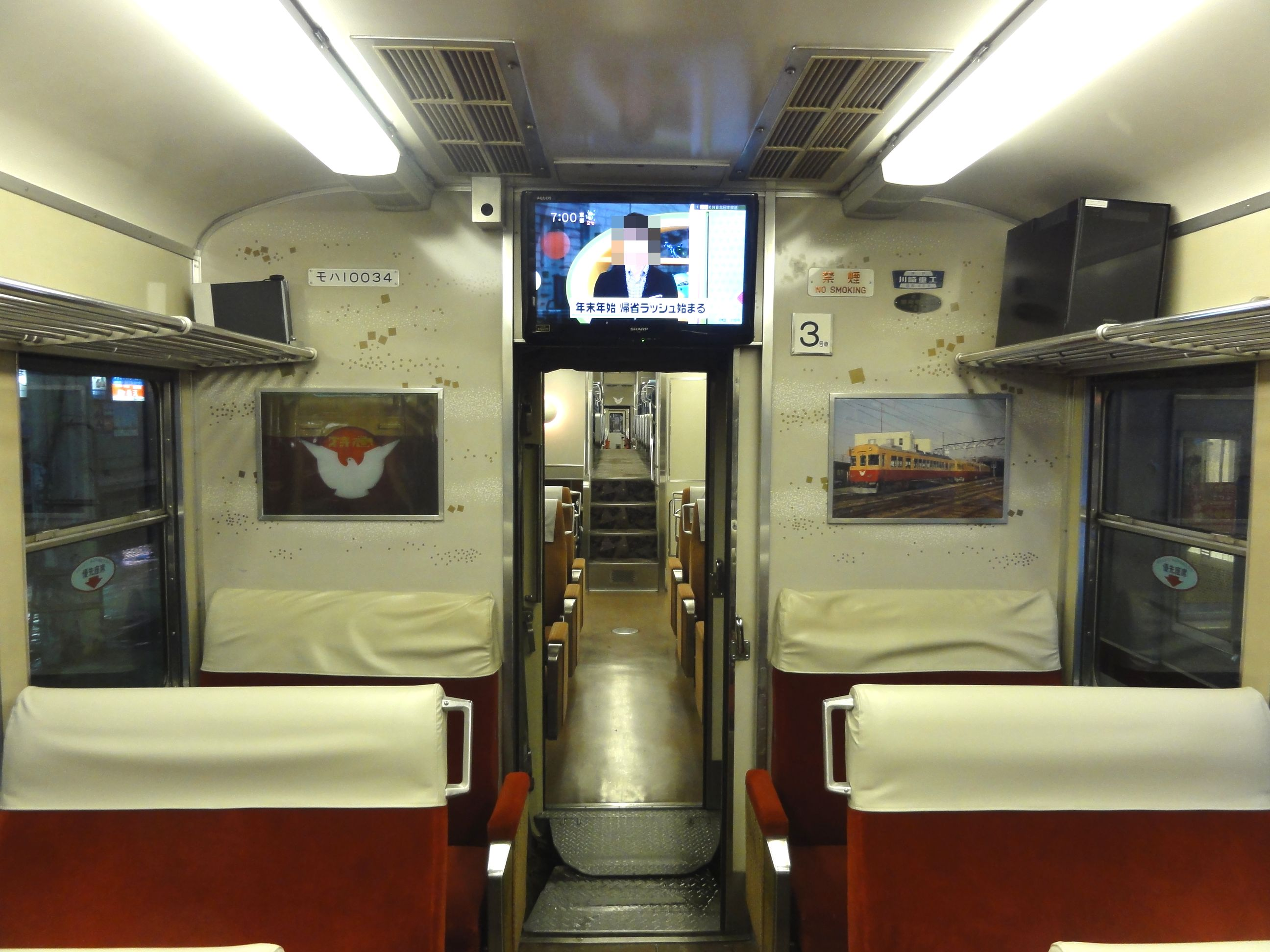 富山地方鉄道10030形電車内部